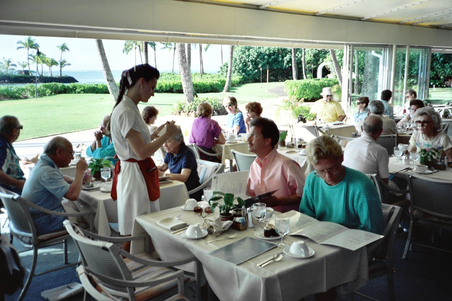 Rose Friedman y su marido Milton, a la izquierda de la camarera.